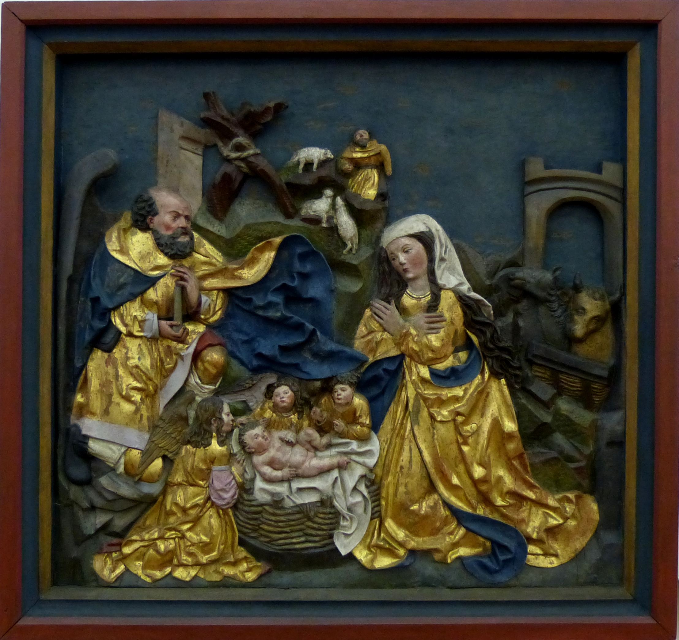 Flügelrelief von Lux Maurus, Kempten um 1520, Lindenholz, 99 x 113 cm